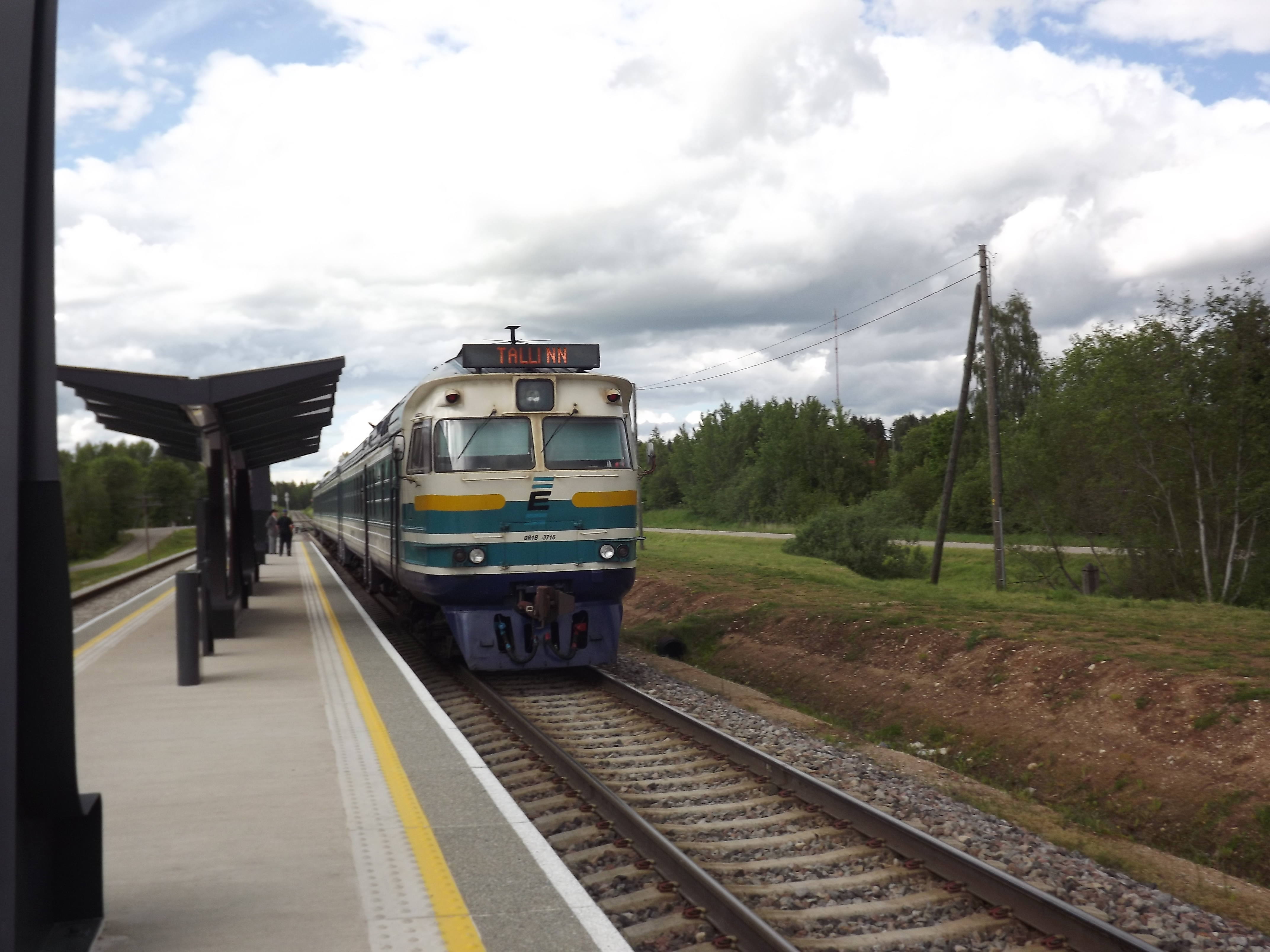 Edelaraudtee reisirong Puka jaamas